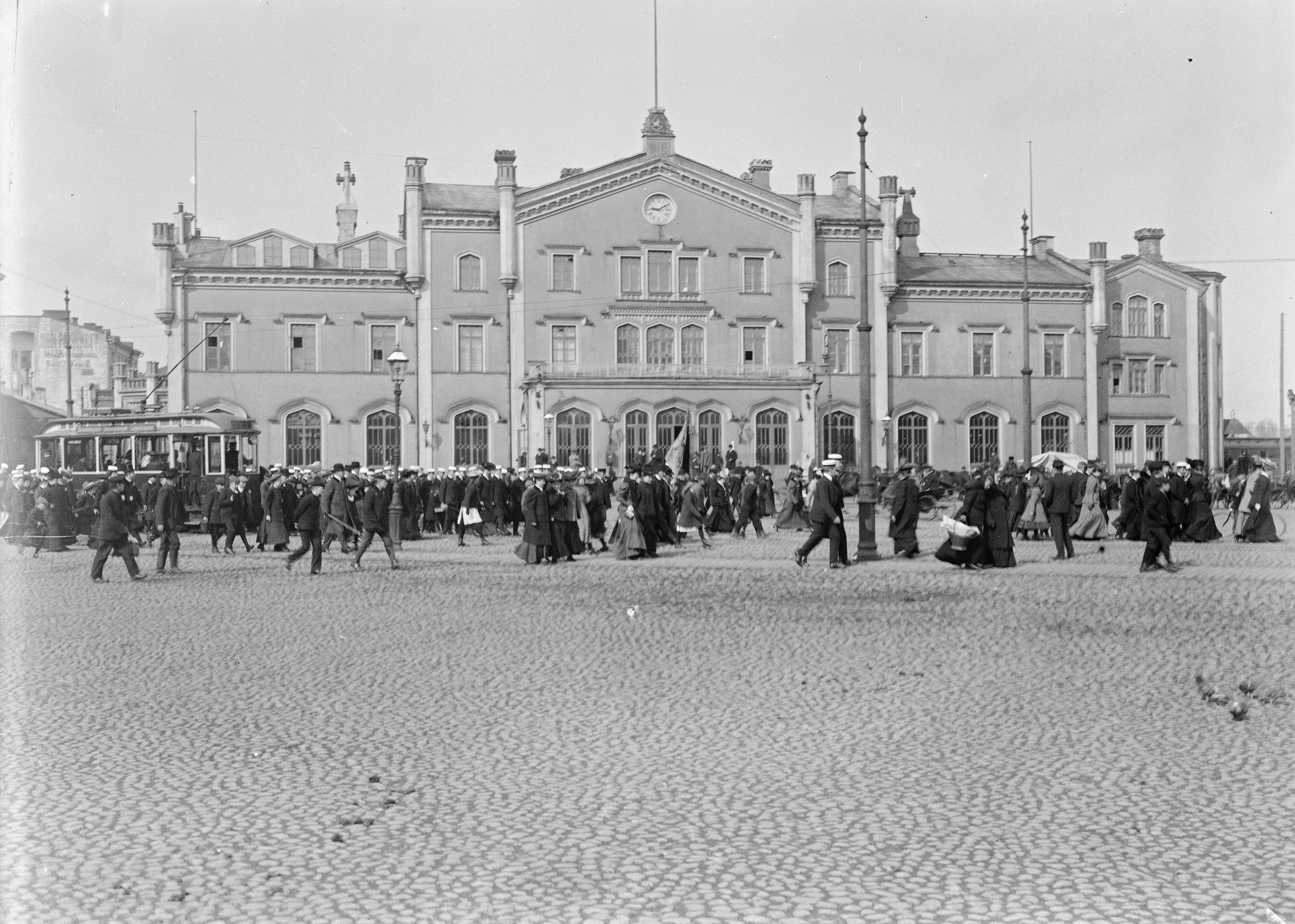 Järnvägsstationen. Foto Gustaf Sandberg. sls1849_329 Ur boken Helsingfors i ord och bild Utgiven av Svenska litteratursällskapet i Finland, 2012